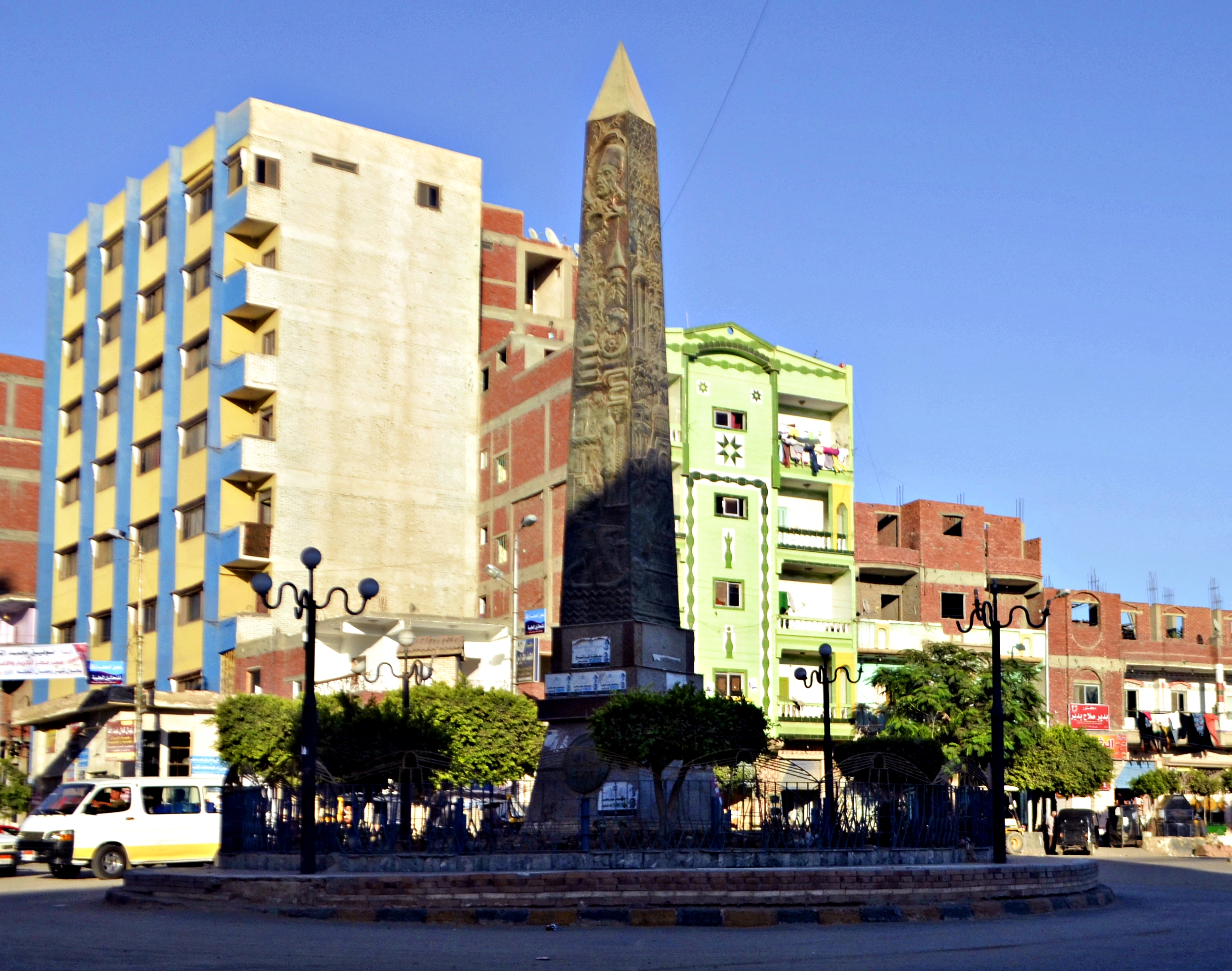 ميدان بسخا، كفر الشيخ، مصر